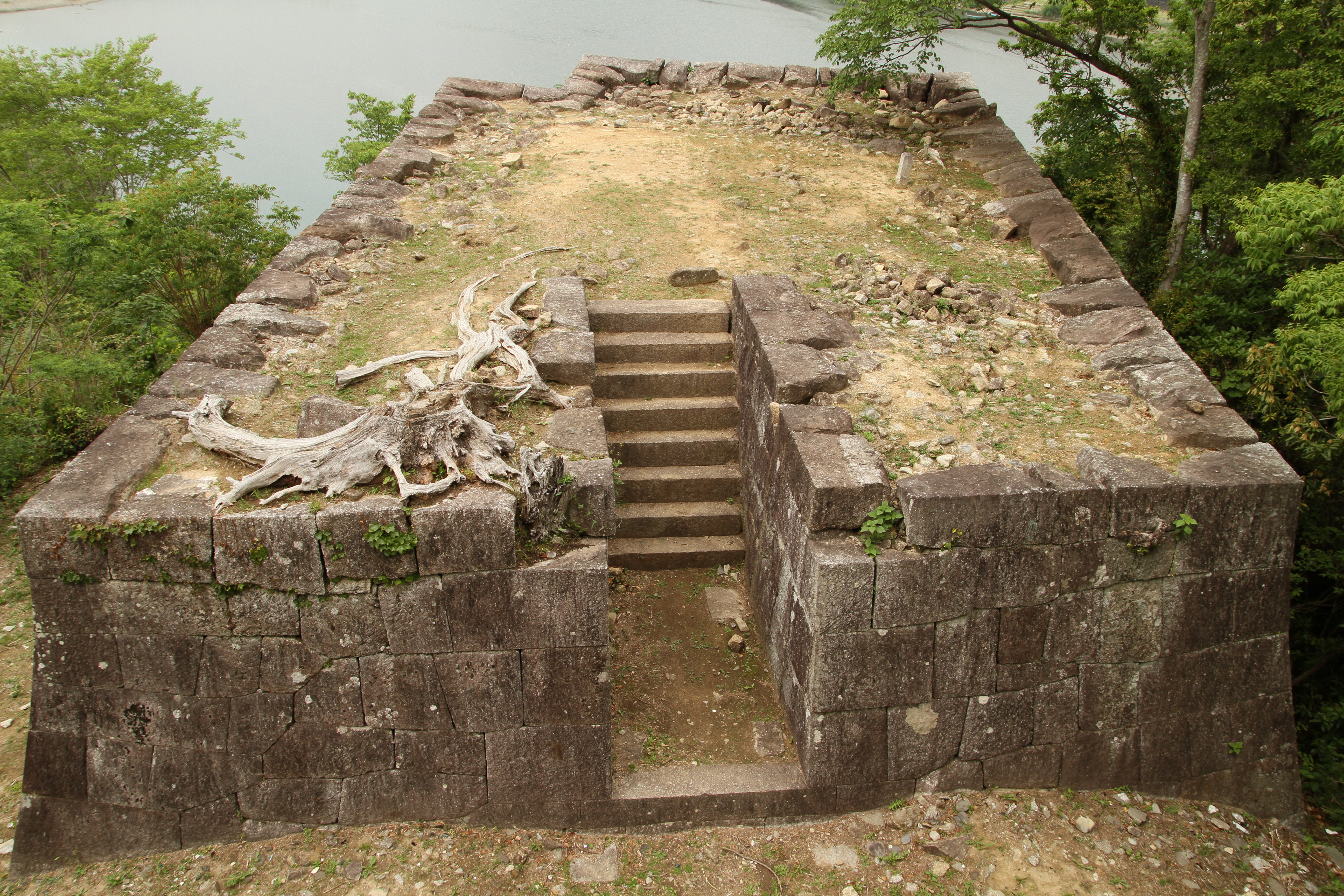 新宮城の出丸